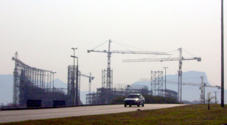 Vista da construção da Cidade da Música do Rio de Janeiro a partir da Avenida das Américas.